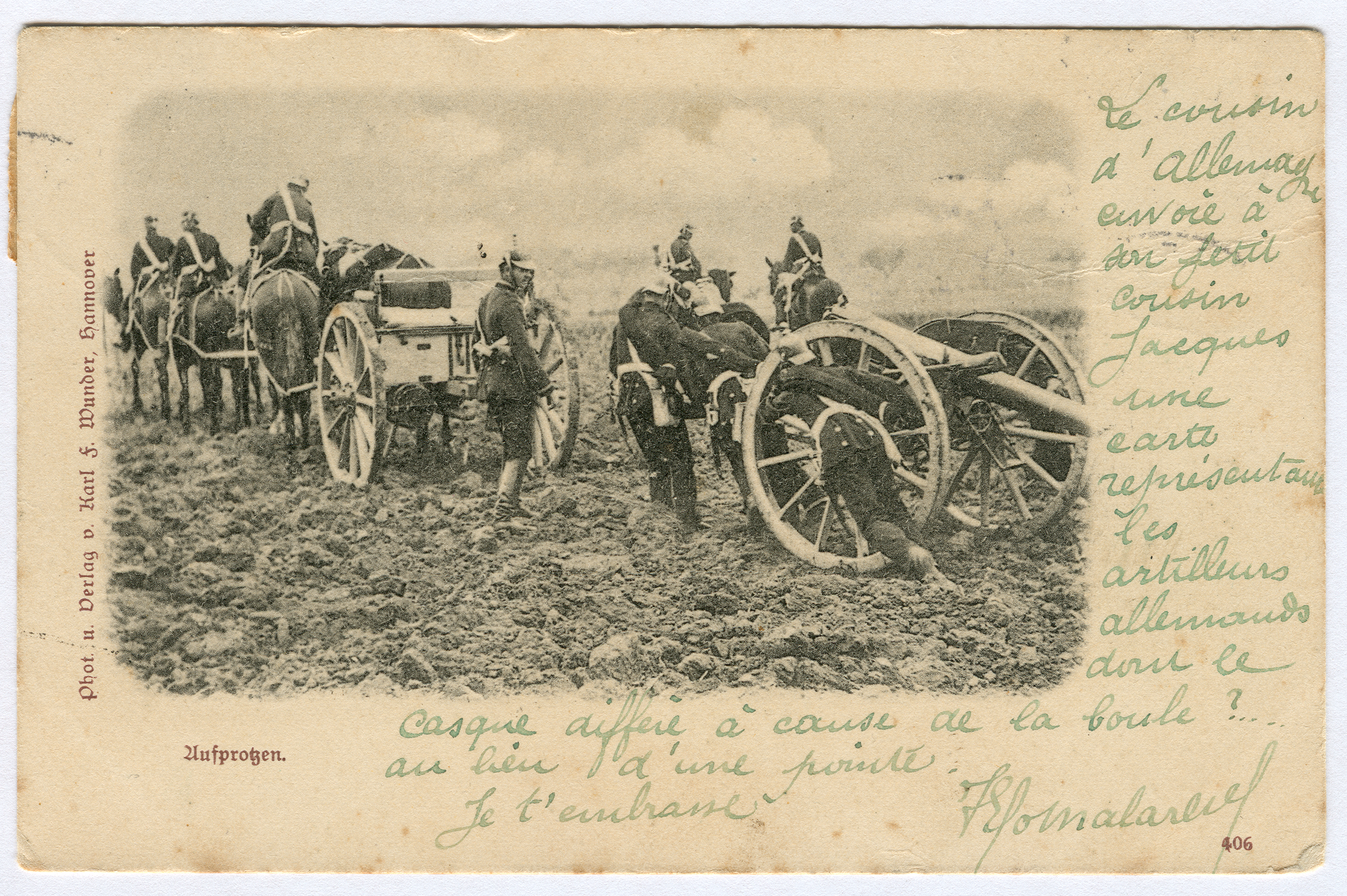 "Aufprotzen": Soldaten schieben mühevoll eine schwere Kanone durch den Schlamm, um sie an ein Gespann mit sechs Pferden anzukoppeln.